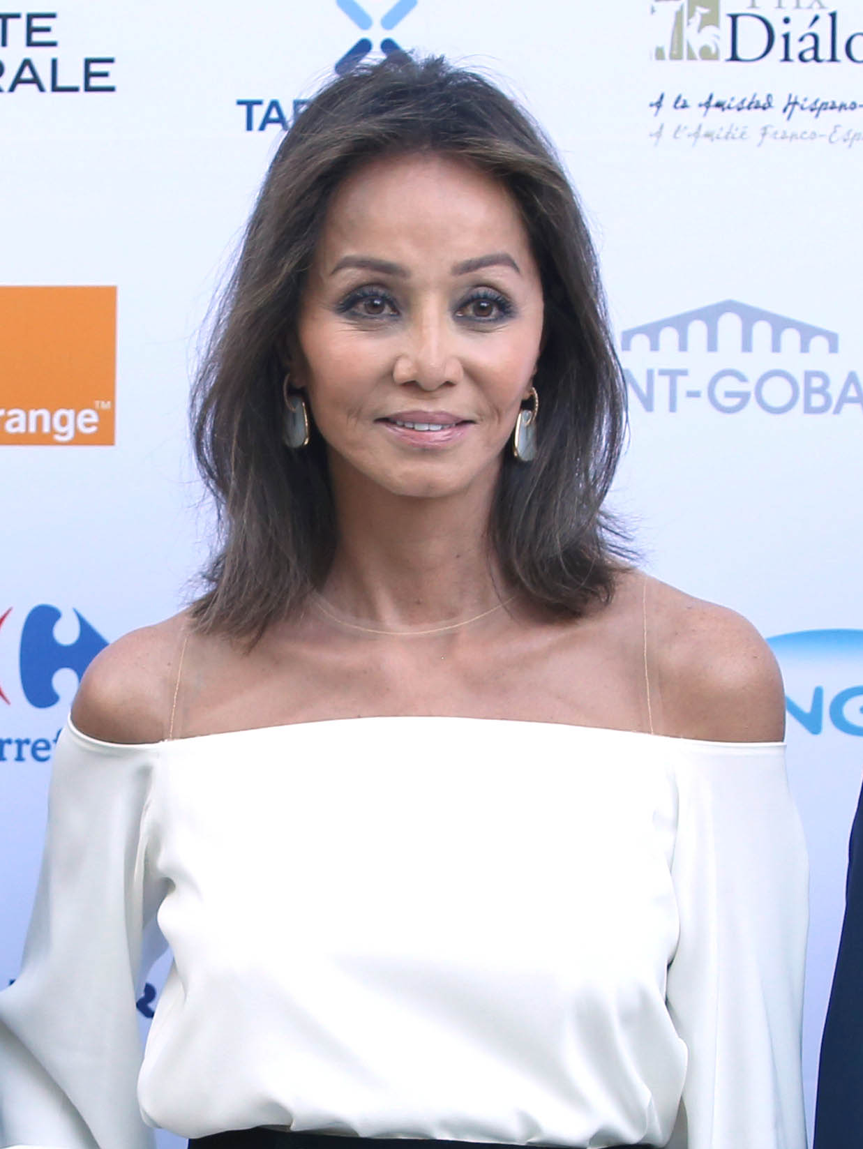 XIII Prix Diálogo - Ceremonia de entrega